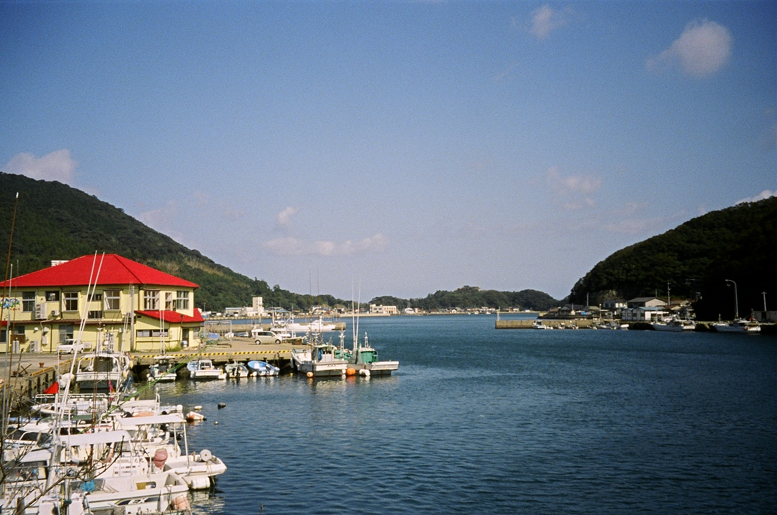 対馬市上対馬町比田勝、比田勝港